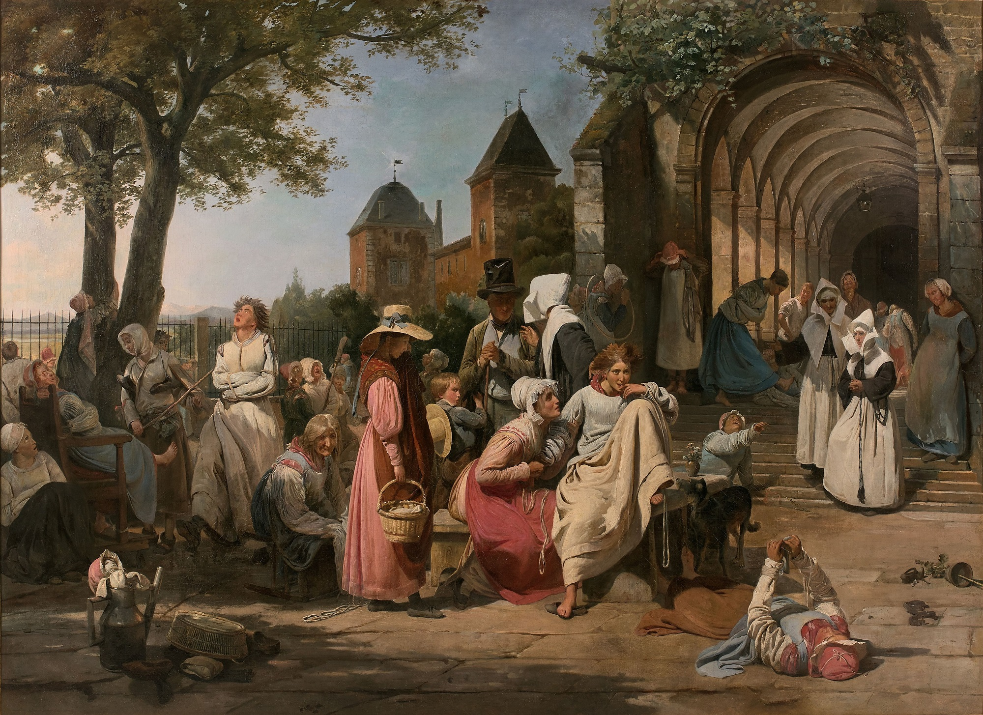 Huile sur toile 158,5x219 cm Galerie De Bayser Photo : Galerie De Bayser